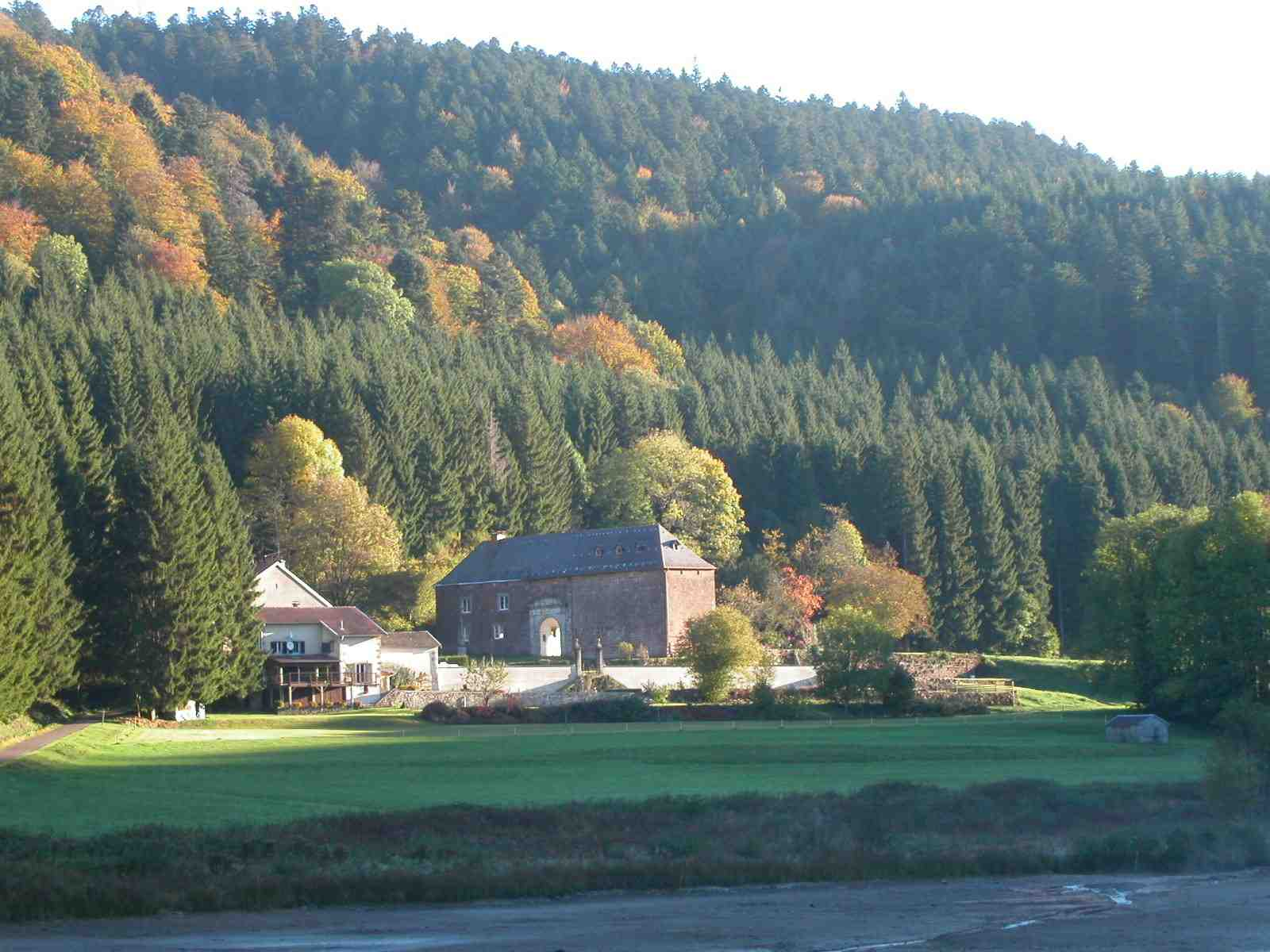 Gilbert Villemin